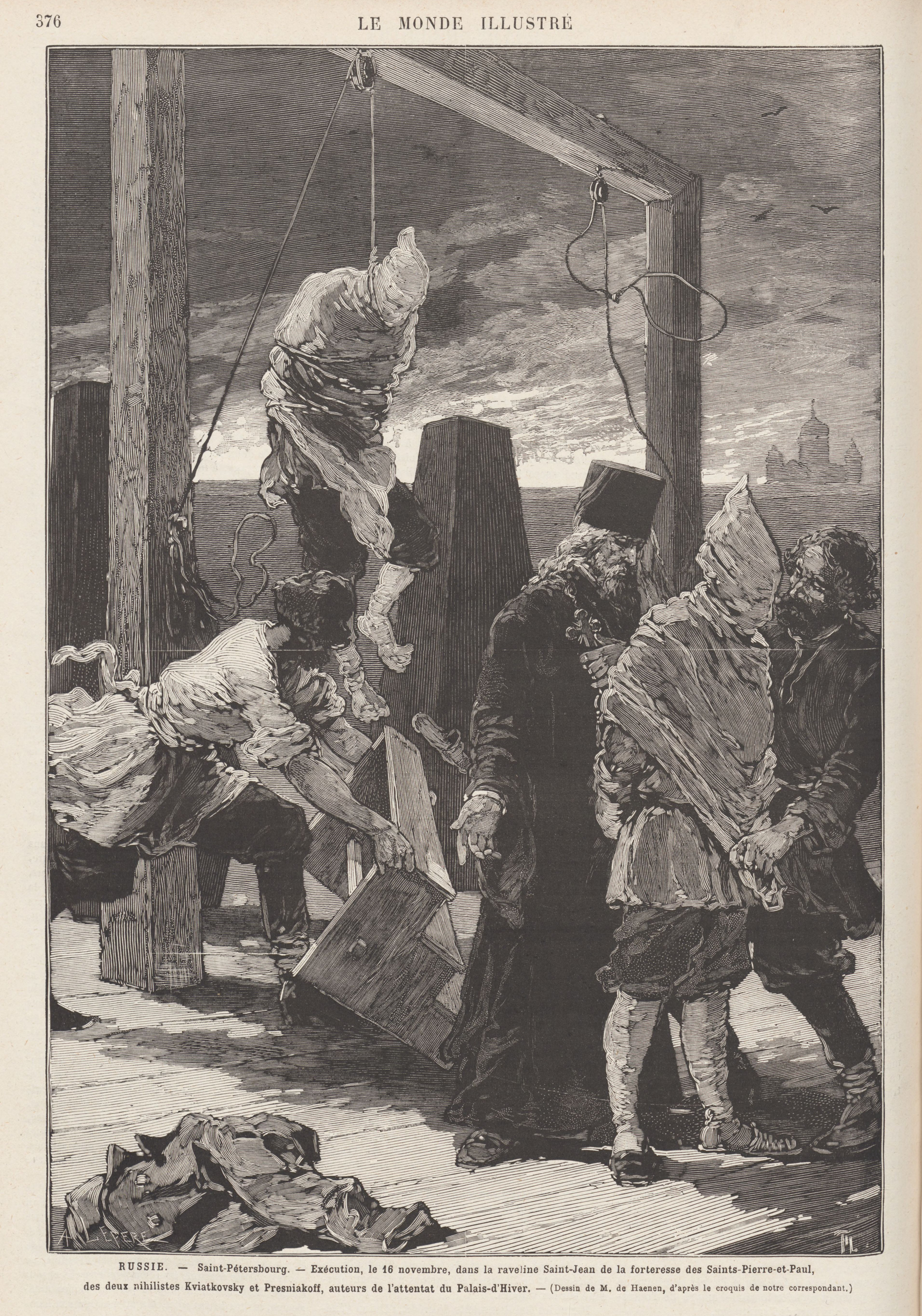 Russie.—Saint-Pétersbourg. — Exécution, le 16 de novembre, dans la raveliné Saint-Jean de la forteresse des Saints-Pierre-et-Paul, des deux nihilistes Kviatkovsky et Presniakoff, auteurs de l'attentat du Palais-d'Hiver. — (dessin de M. de Haenen, d'après le croquis de notre correspondant.).